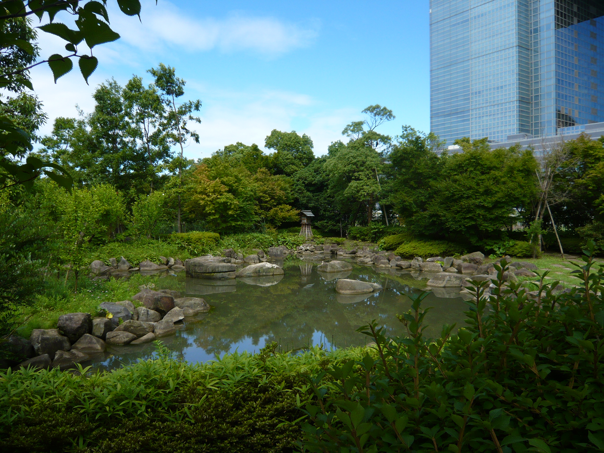 Aomi Minami Port Park (Aomi-Minami-Futou-Kouen) in Koto-ku, Tokyo, Japan.